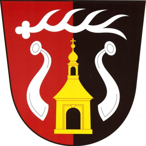 Nezbavětice znak